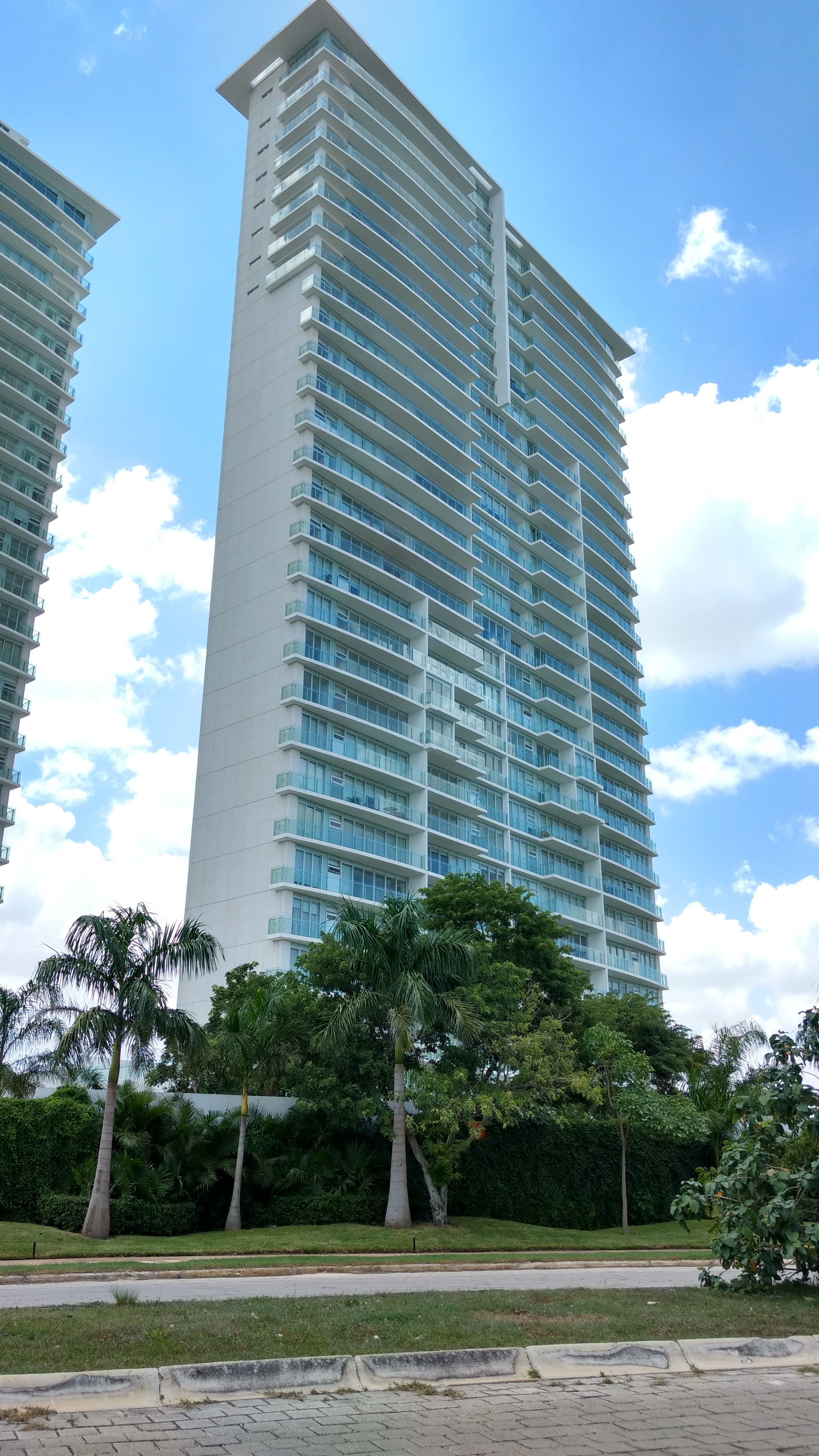 Torre Acua del complejo departamental "Country Towers" de Mérida. Con una altura de 107 metros, son los edificios más altos de la ciudad de Mérida, Yucatán, y de todo el sureste mexicano hasta la fecha de la publicación de esta imagen.